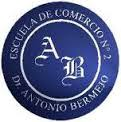 Logo oficial de la Escuela de Comercio N° 2 DE 1 "Dr. Antonio Bermejo" (Buenos Aires, Argentina) realizado por alumnos de la institución.